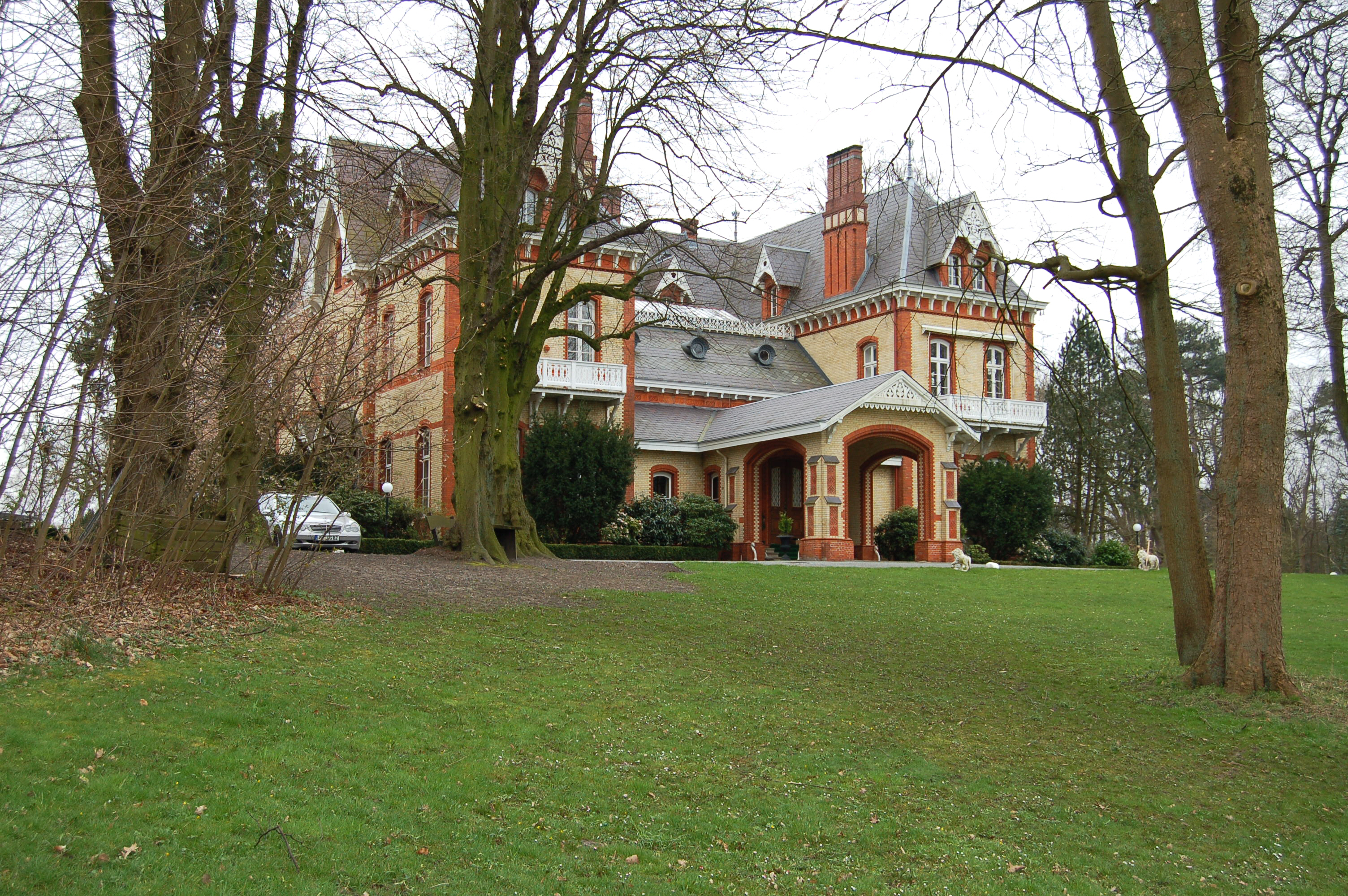 Straßenansicht des Schloss Düneck in Moorrege